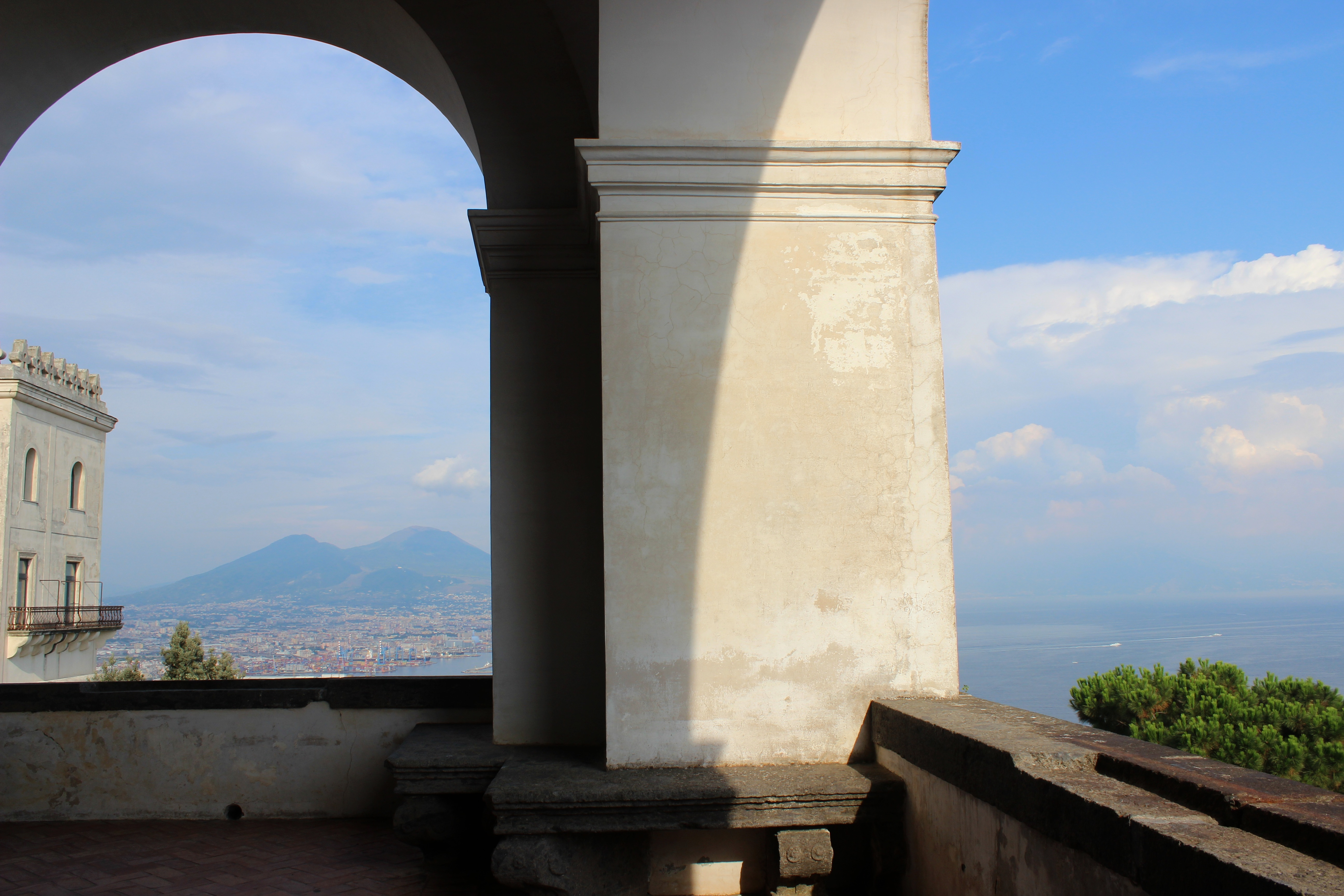 Nápoles. Certosa di San Martino, terraza del Quarto del Priore.